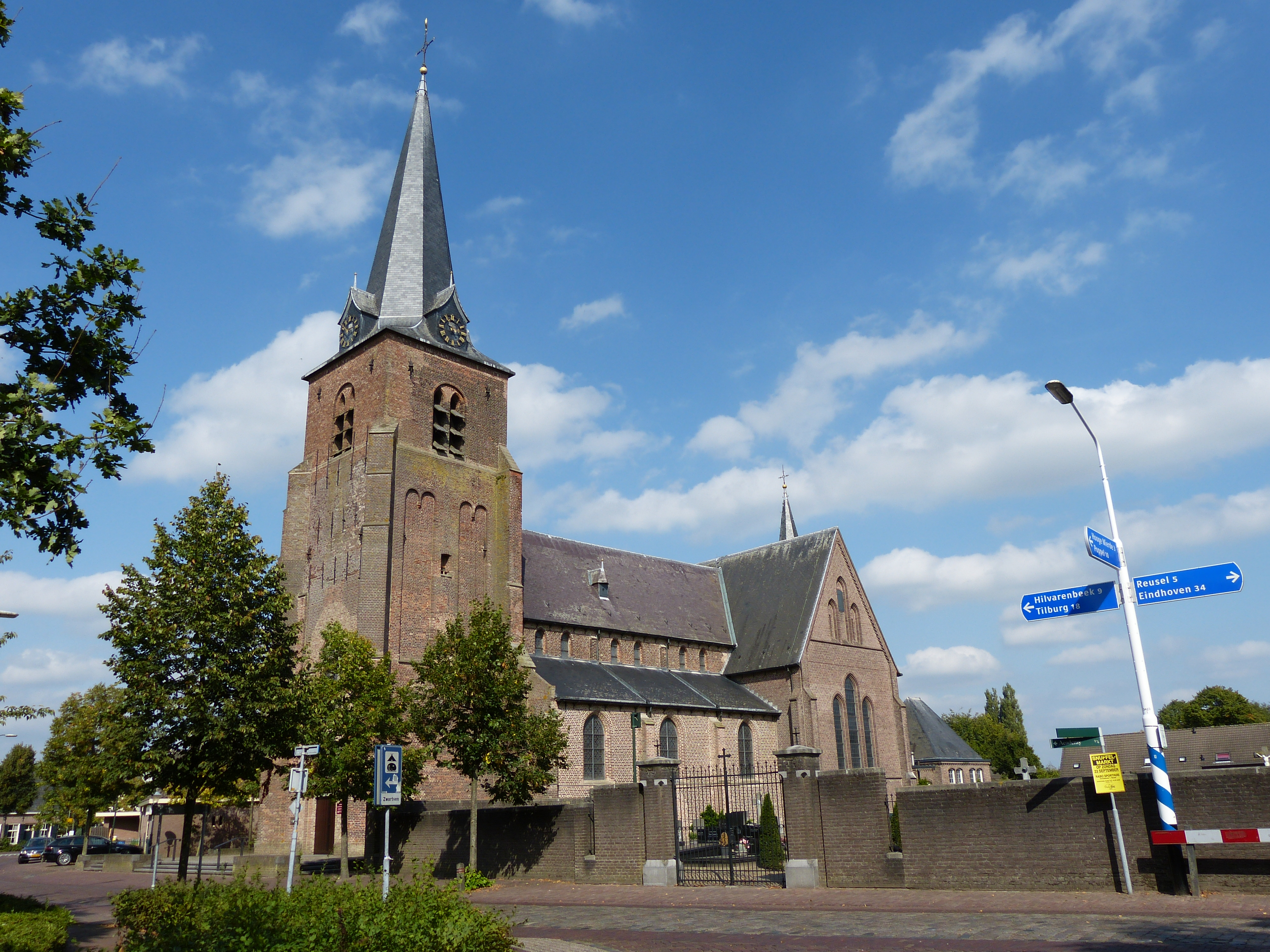 Lage Mierde Stephanuskerk